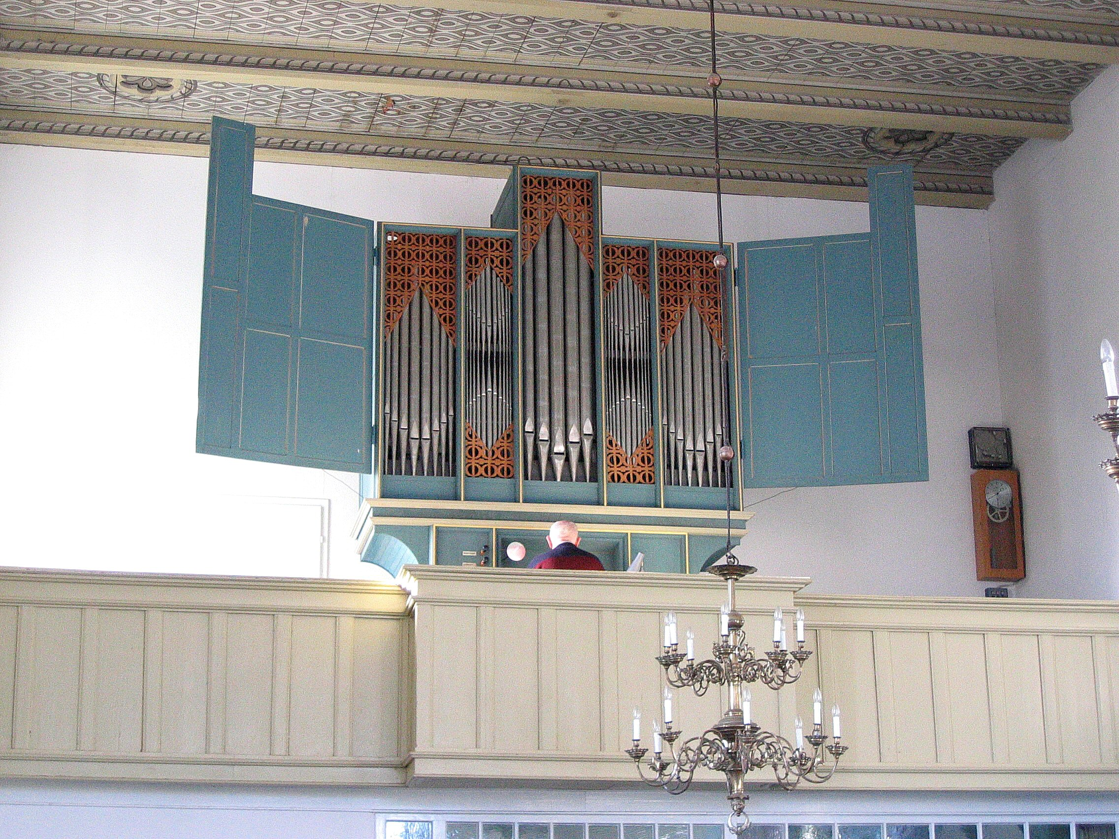 Orgel in Grimersum, Landkreis Aurich